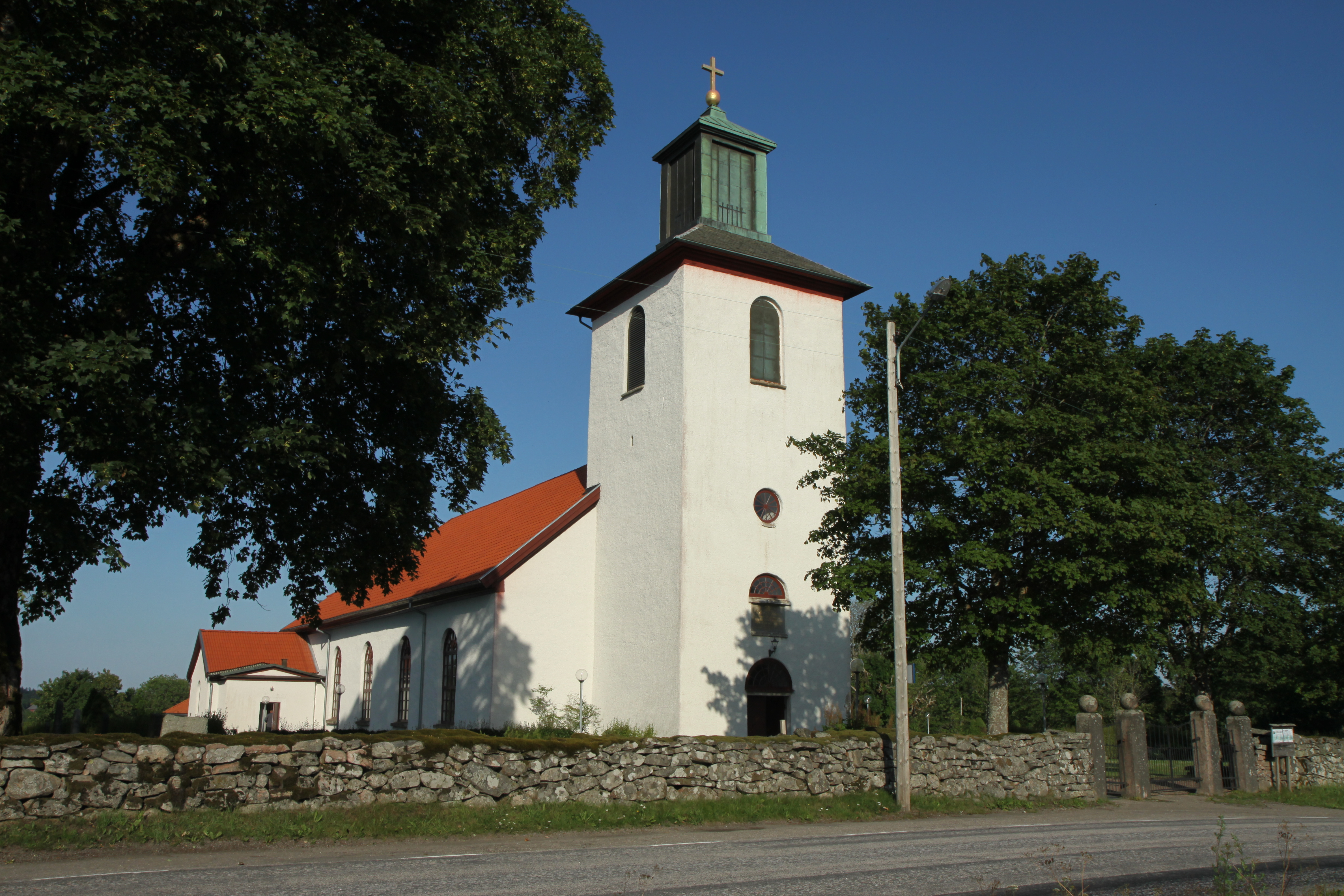 Bredareds kyrka.